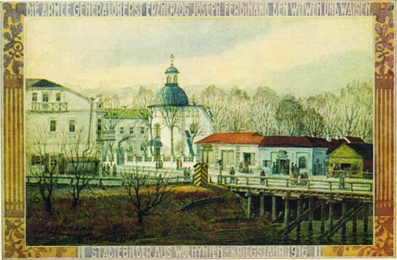 Lutsk in 1916. Луцьк на поштівці Лемана